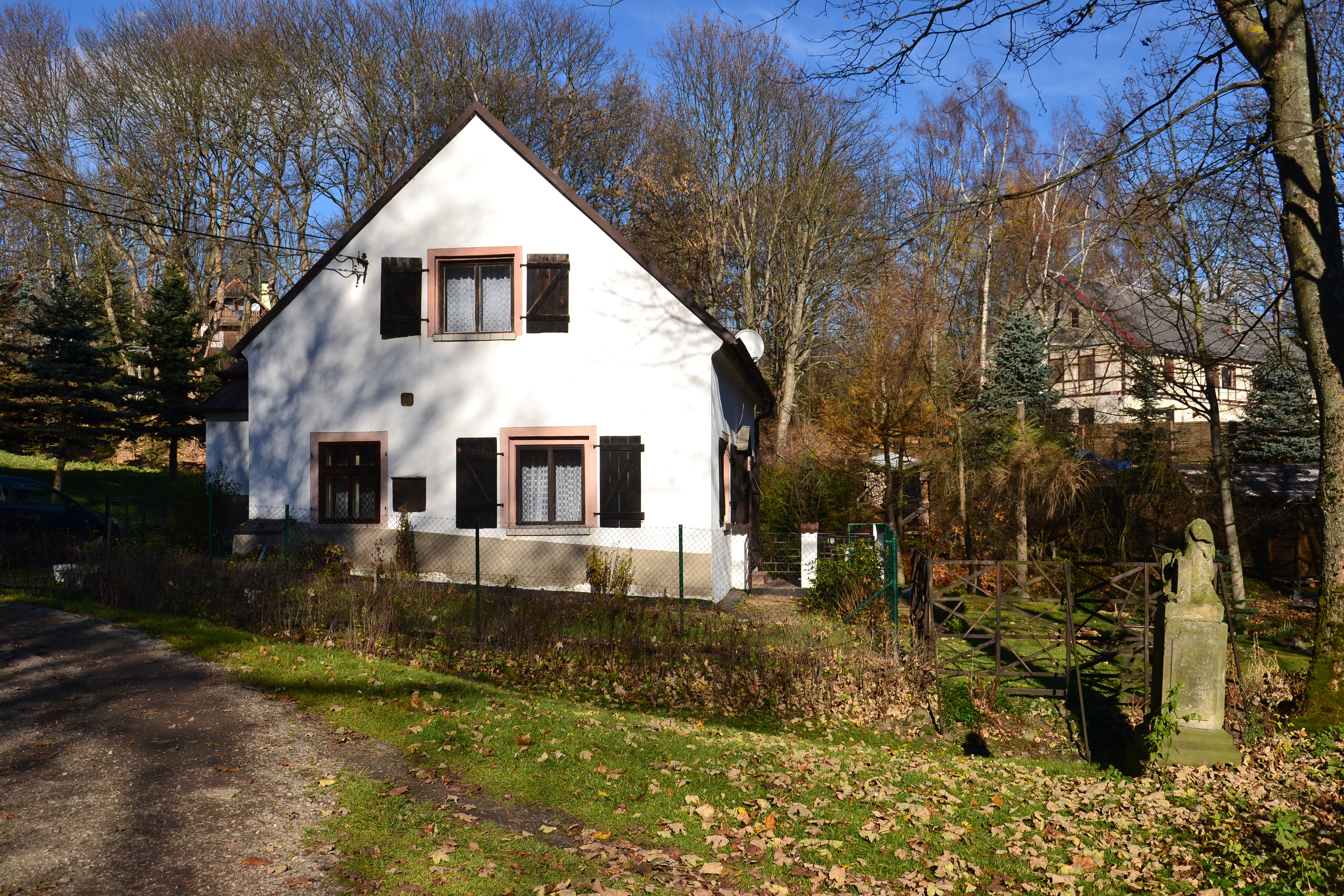 Dům ve středu vesnice